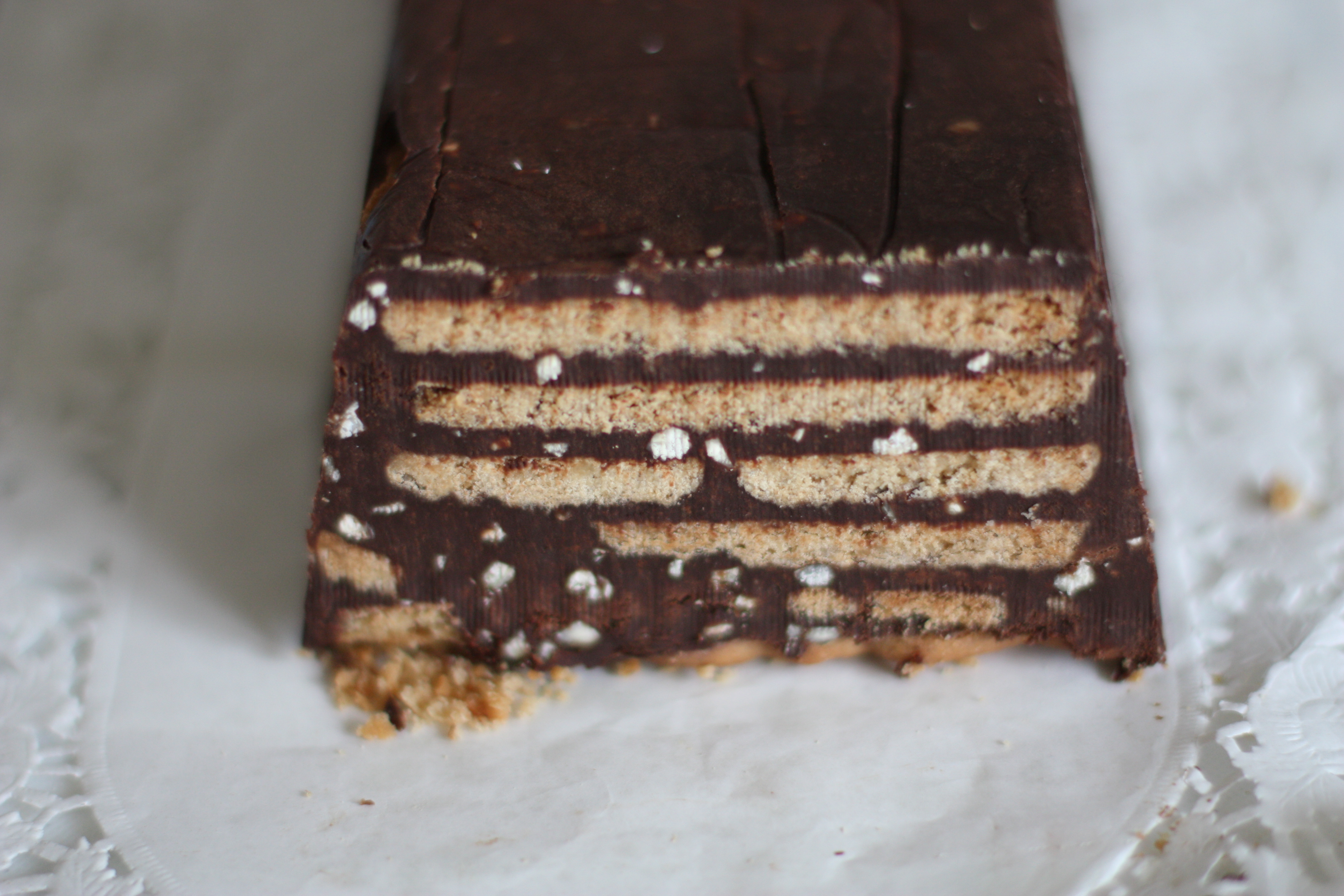 Kalter Hund, Lukullus, Weihnachtsversion - mit Spekulatius, damit die Couvertüre weicher Wird ist Ei untergezogen